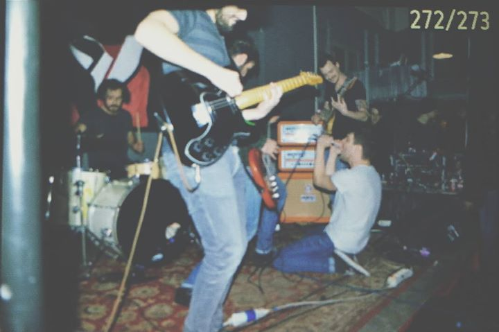 shizune band